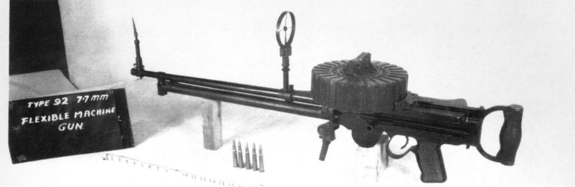 Japanese Type 92 flexible 7,7-mm MG